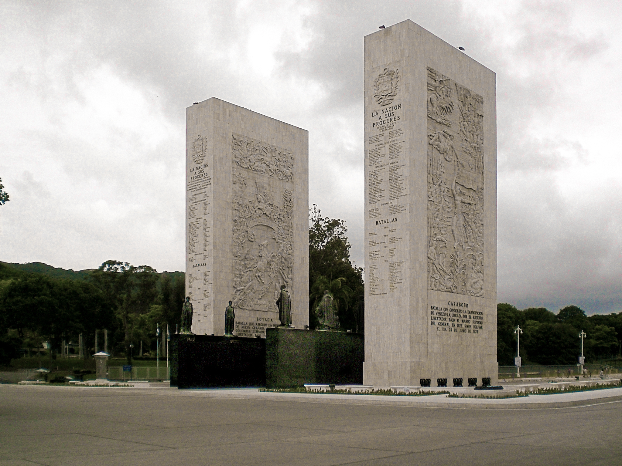 Monoliths at Los Próceres, Caracas, Venezuela